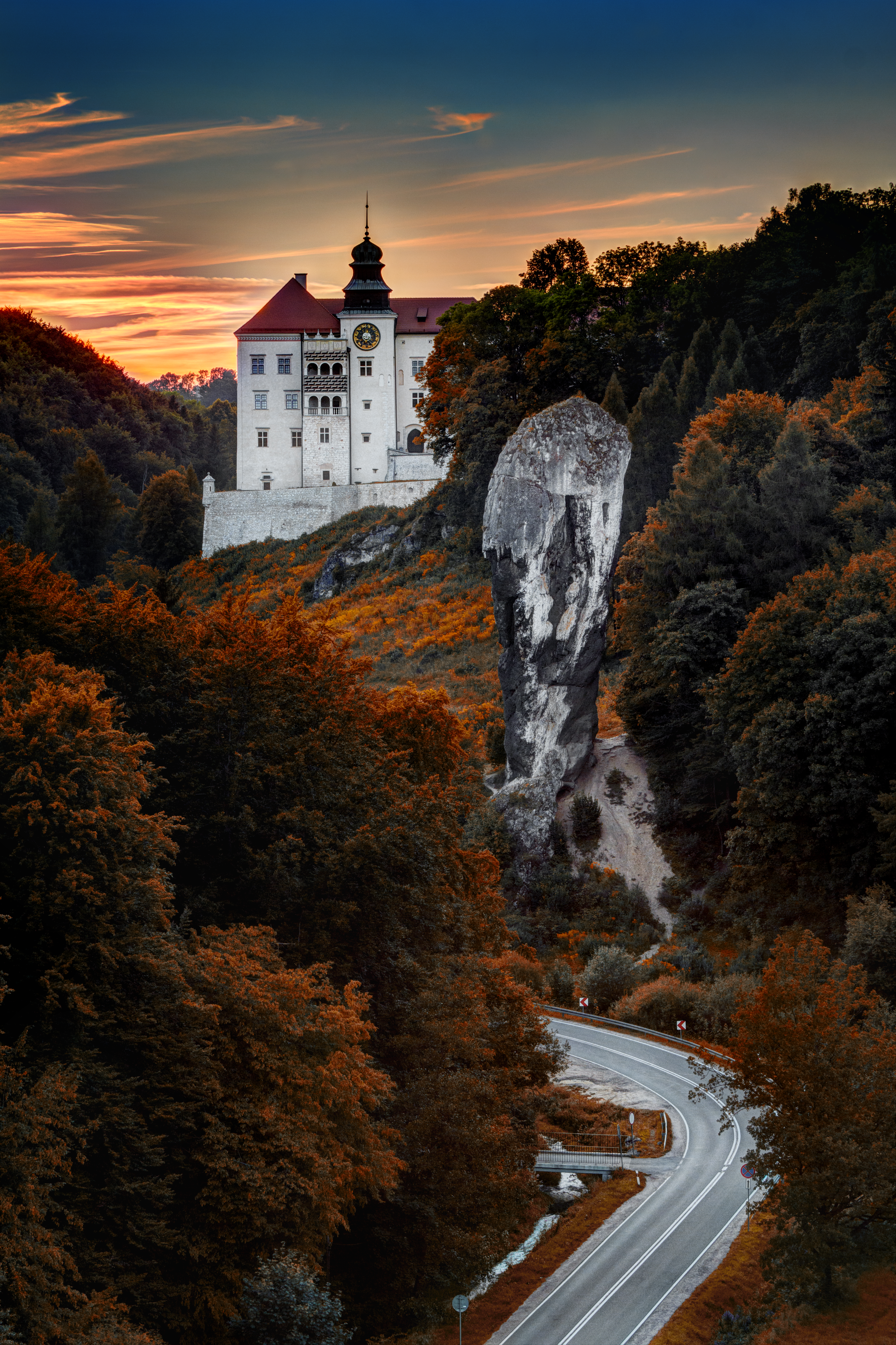 Zamek Pieskowa Skała Wikidata has entry Q1780430 with data related to this item.